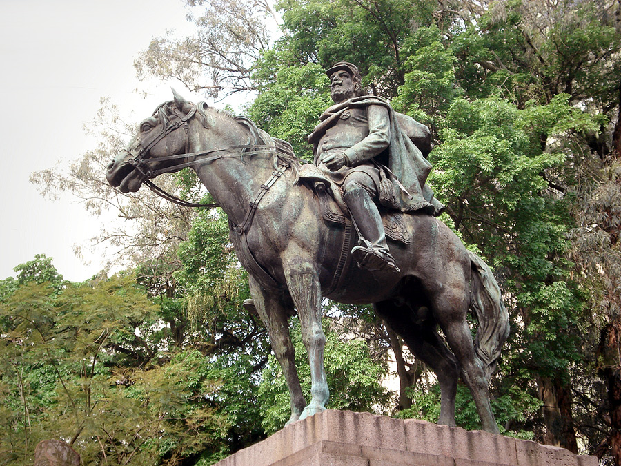 Monumento eqüestre o General Osório, na Praça da Alfândega, em Porto Alegre, Brasil. Obra de H. Leão Velloso, de 1933